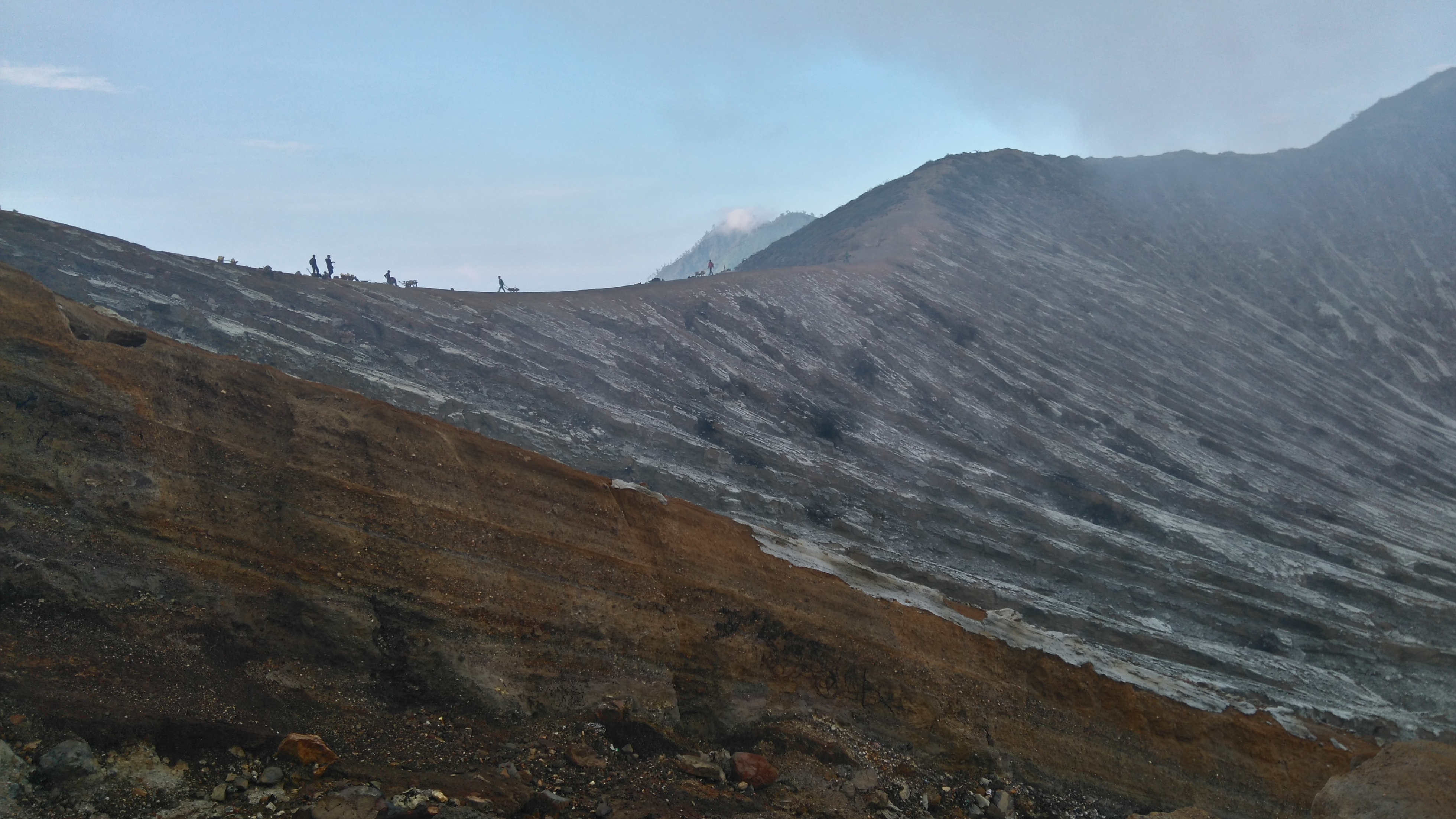 Basa Jawa: Kawah Ijen Banyuwangi